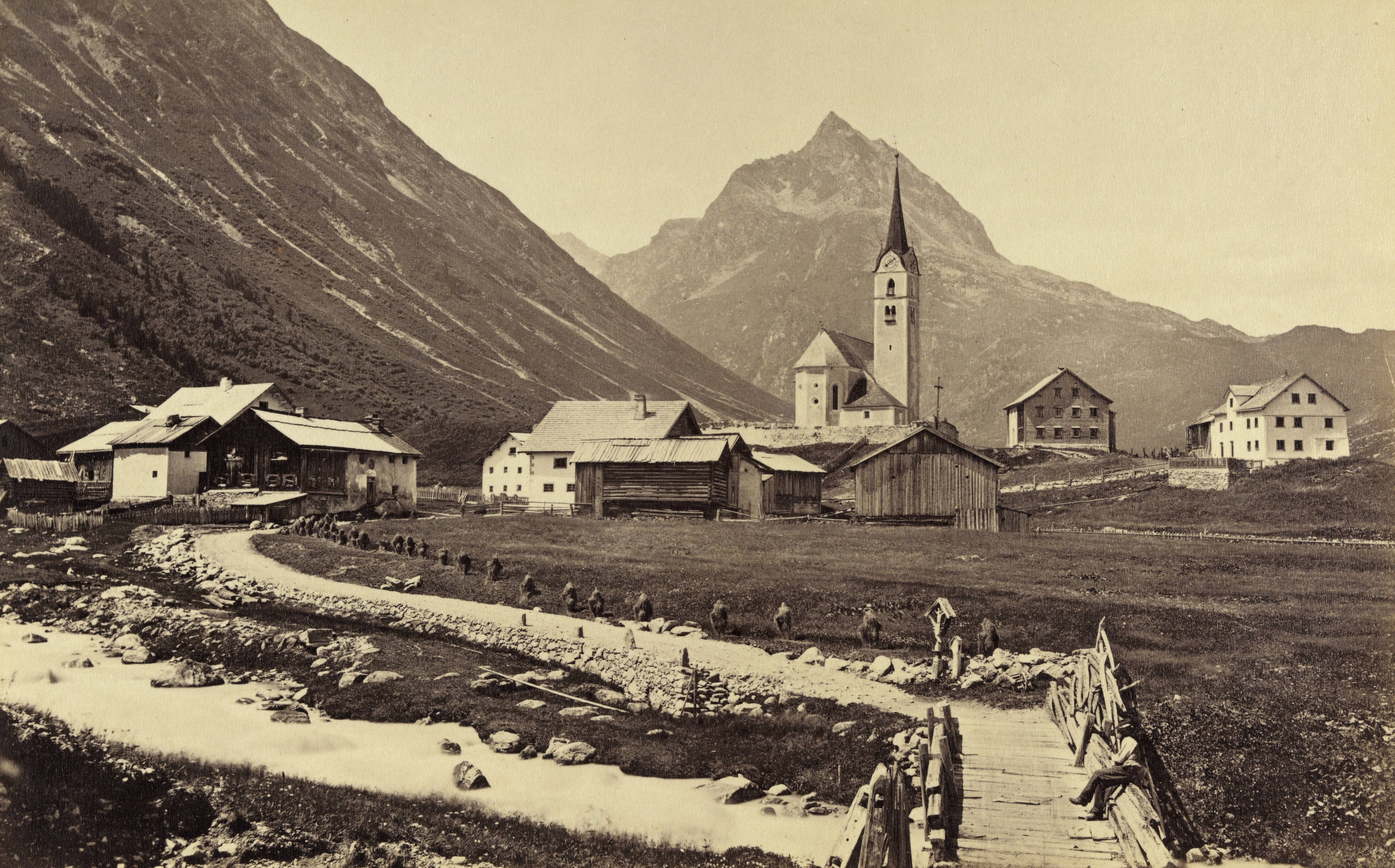 Galtür im Paznauntal. Fotografie : Albumin-Abzug, auf Karton montiert